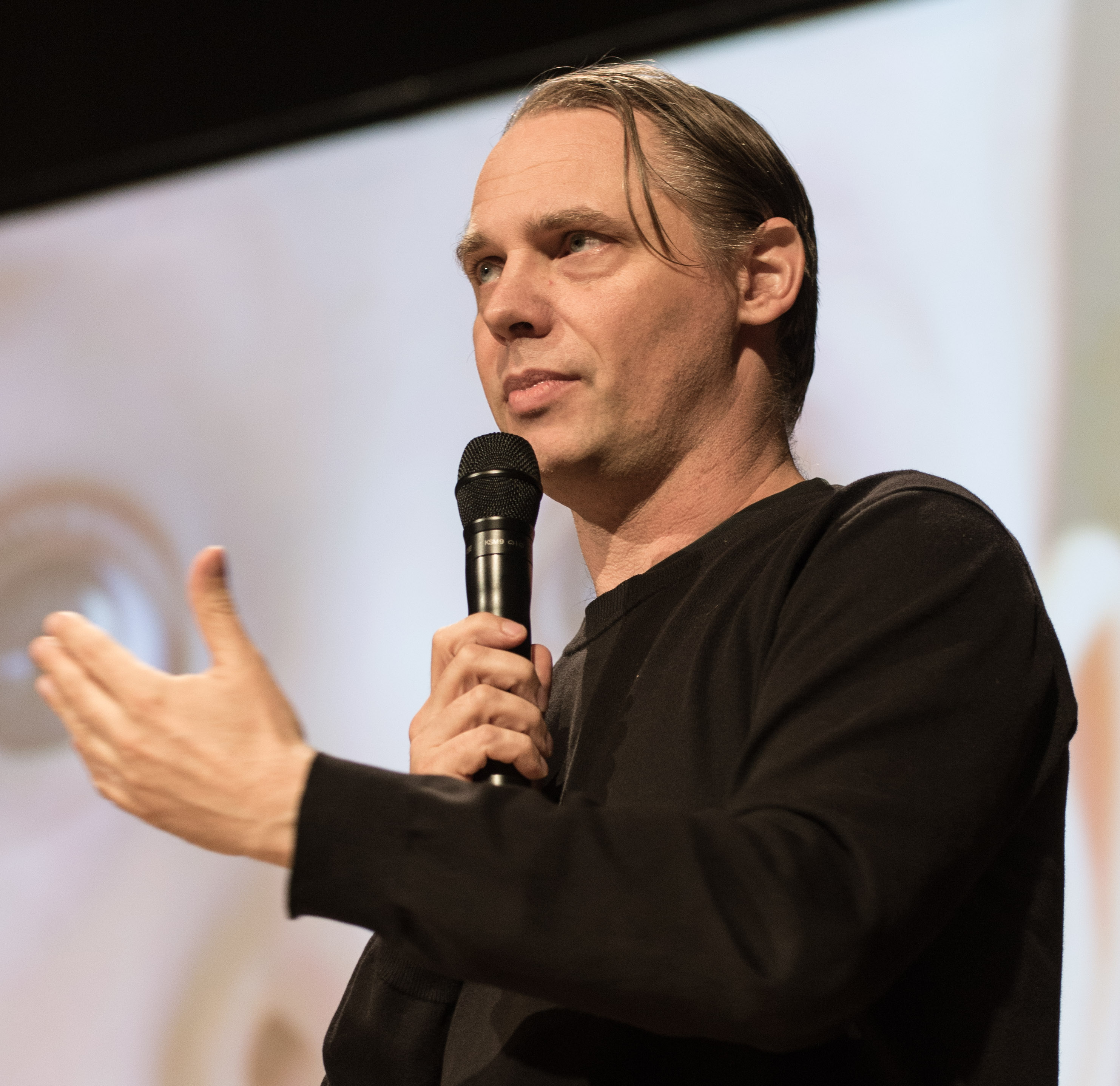 Mattias Andersson under Öppet Hus på Dramaten den 19 september 2015. Andersson regisserar Idioten på Dramaten i en nytolkning.